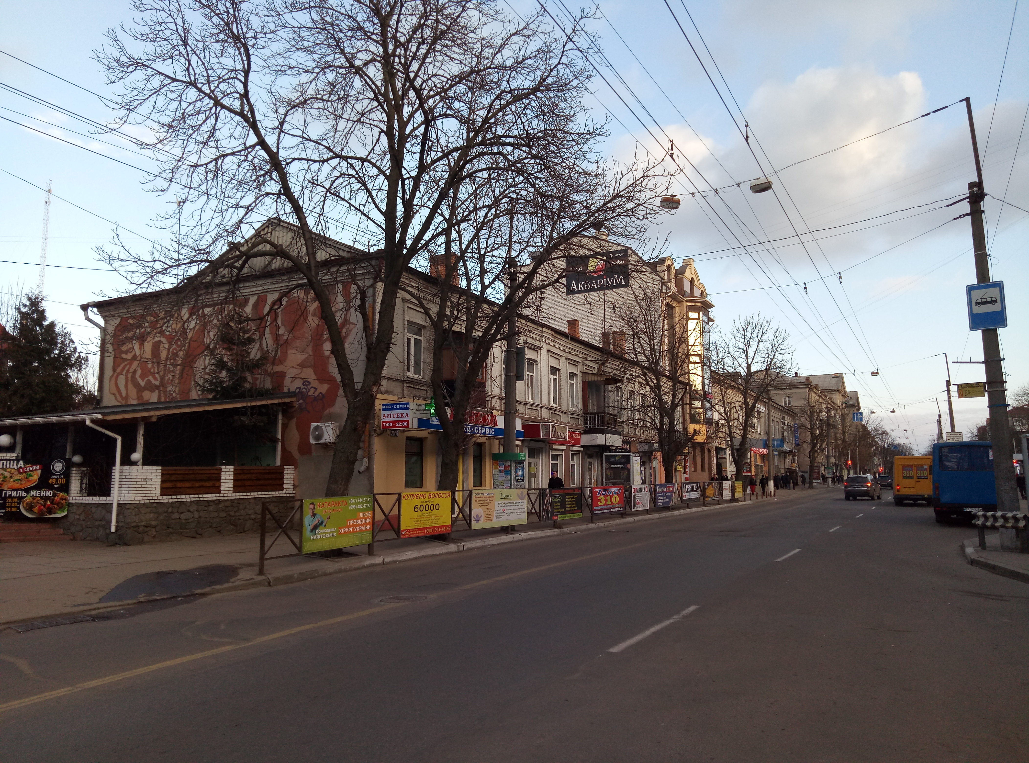 Місто Кременчук вулиця Небесної Сотні - зупинка Центр